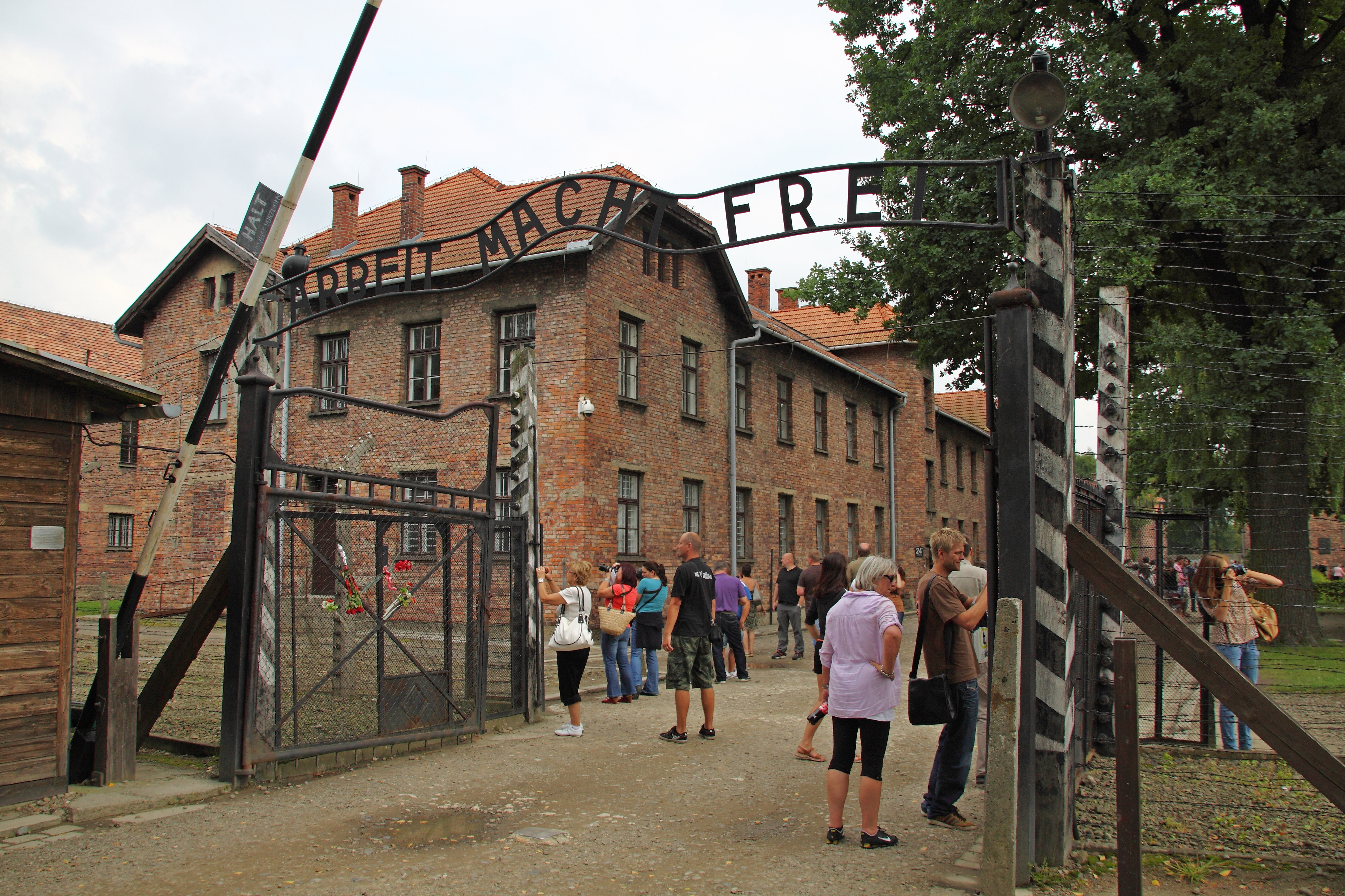 Oświęcim, zespół Byłego Nazistowskiego Niemieckiego Obozu Koncentracyjnego i Zagłady Ausc…, 1940-1945